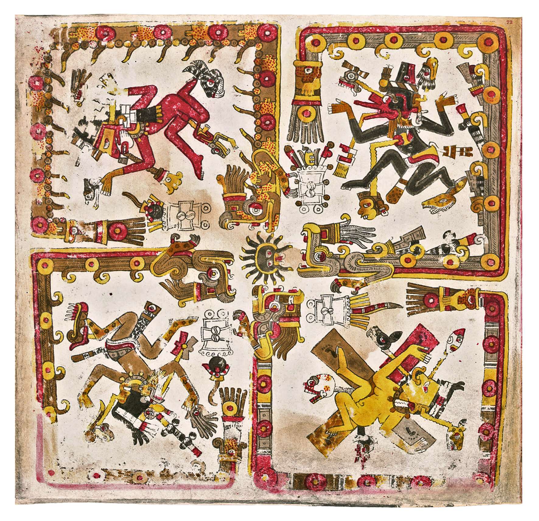 Page 72 du Codex Borgia (fac-similé). Les 4 directions aztèques plus le Centre. Foundation for the Advancement of Mesoamercan Studies, Inc. (FAMSI).